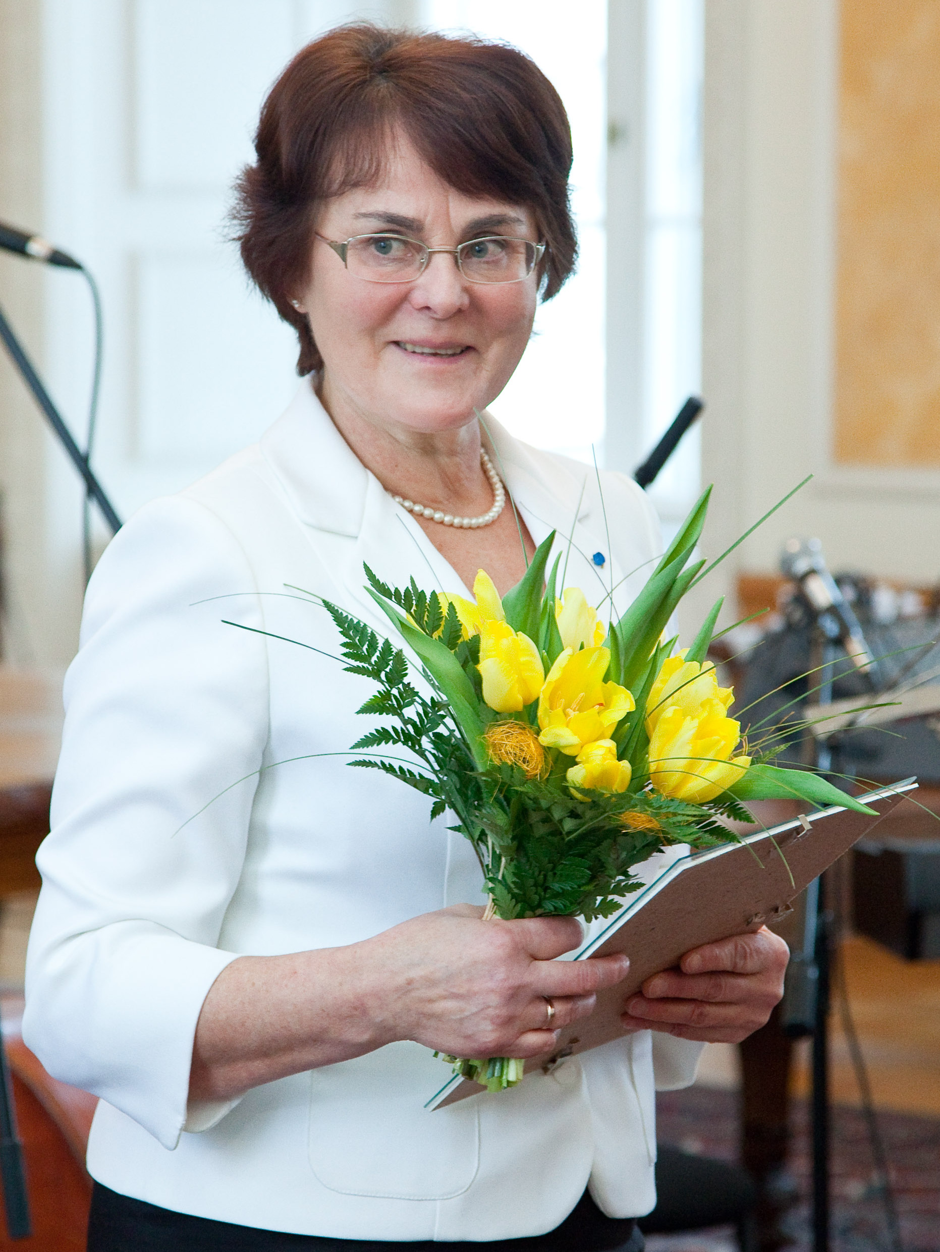 Liia Hänni kodanikuühiskonna aasta tegijate tänuüritusel aasta missiooniinimesena